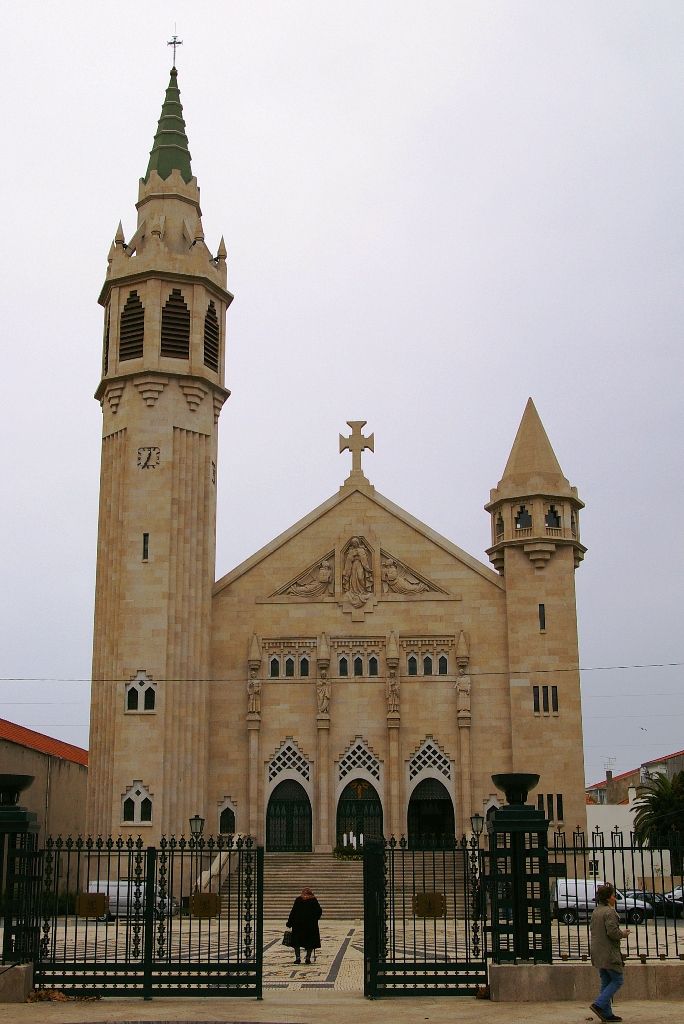 Our Lady of Concepcion (Nossa Senhora da Conceição) church in Porto, Portugal